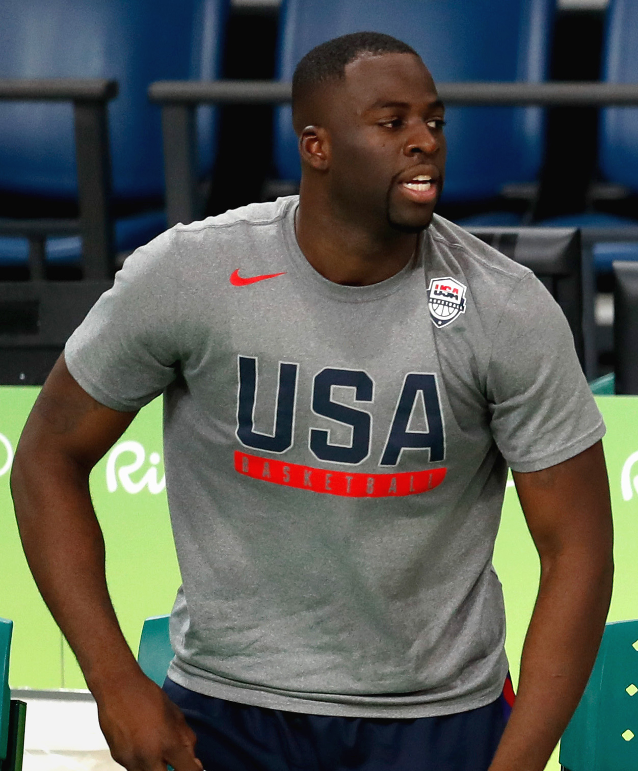 Rio de Janeiro - Seleção de basquete dos Estados Unidos na Arena Carioca dos Jogos Rio 2016 (Fernando Frazão/Agência Brasil)